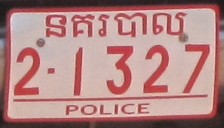 politie kenteken Cambodja